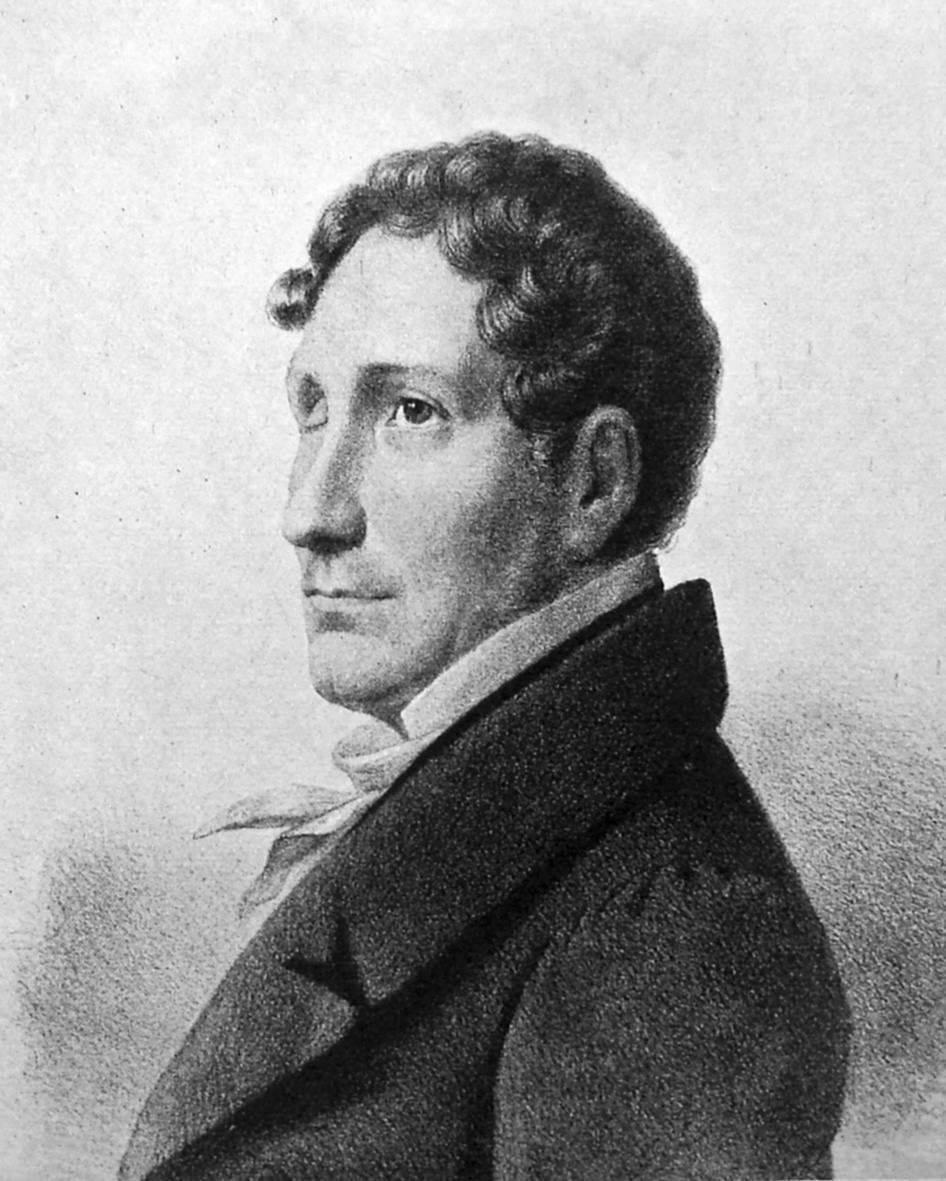 Friedrich Kuhlau (11. september 1786 i Uelzen (Hannover) – 12. marts 1832 i København) var en tysk-dansk komponist.